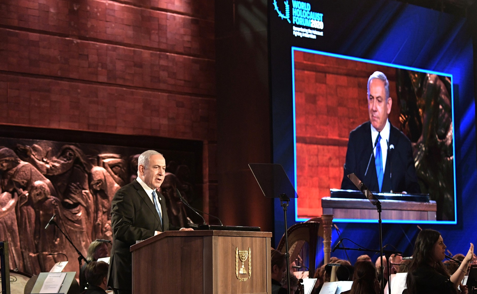 Премьер-министр Израиля Биньямин Нетаньяху на форуме «Сохраняем память о Холокосте, боремся с антисемитизмом».